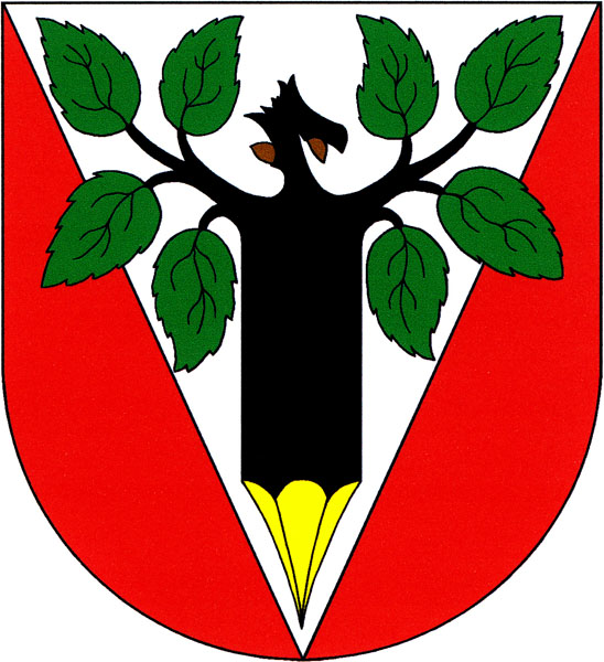 Znak obce Miřetice (okres Chrudim)